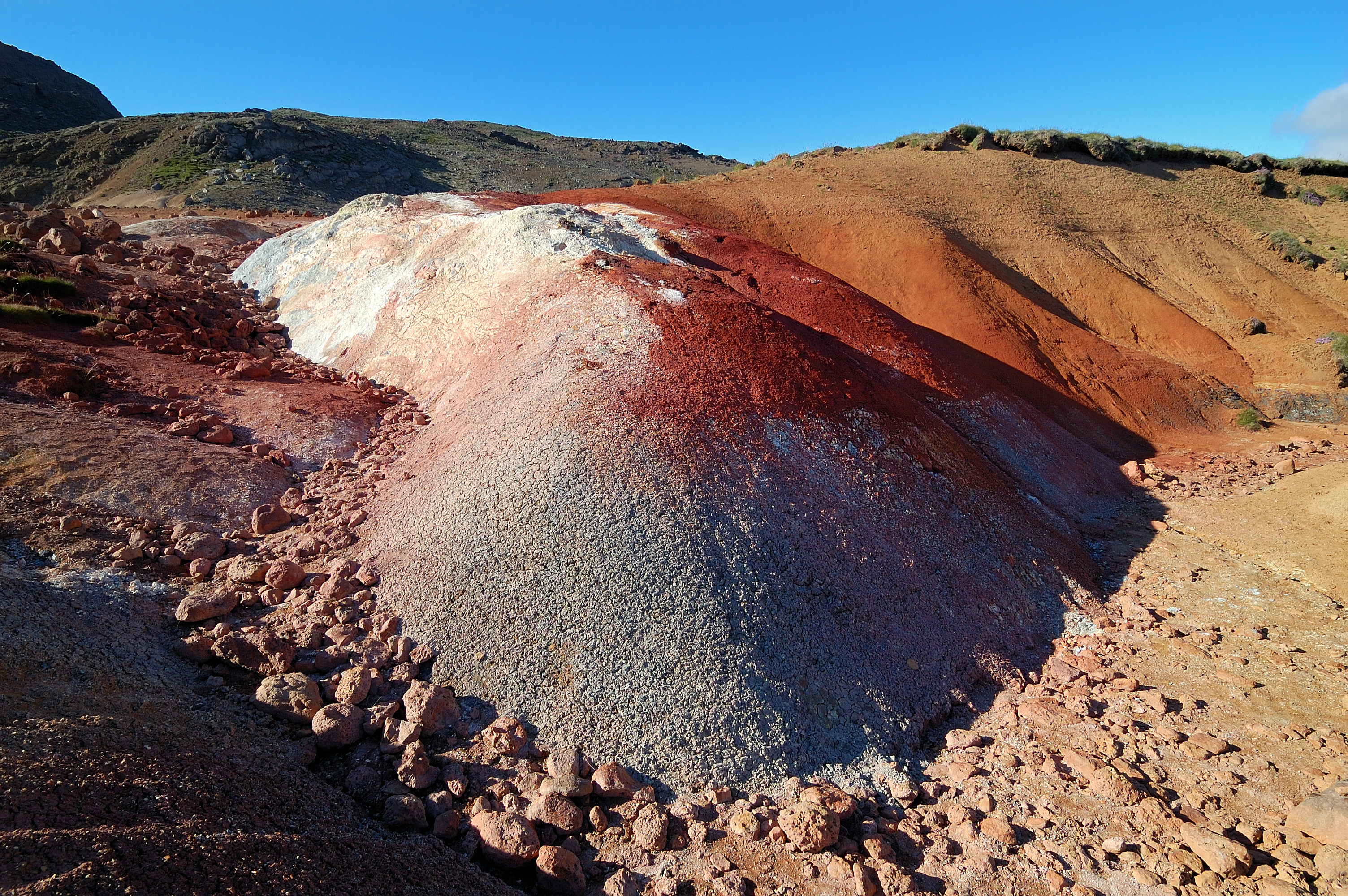 Krýsuvík, Iceland [2008]